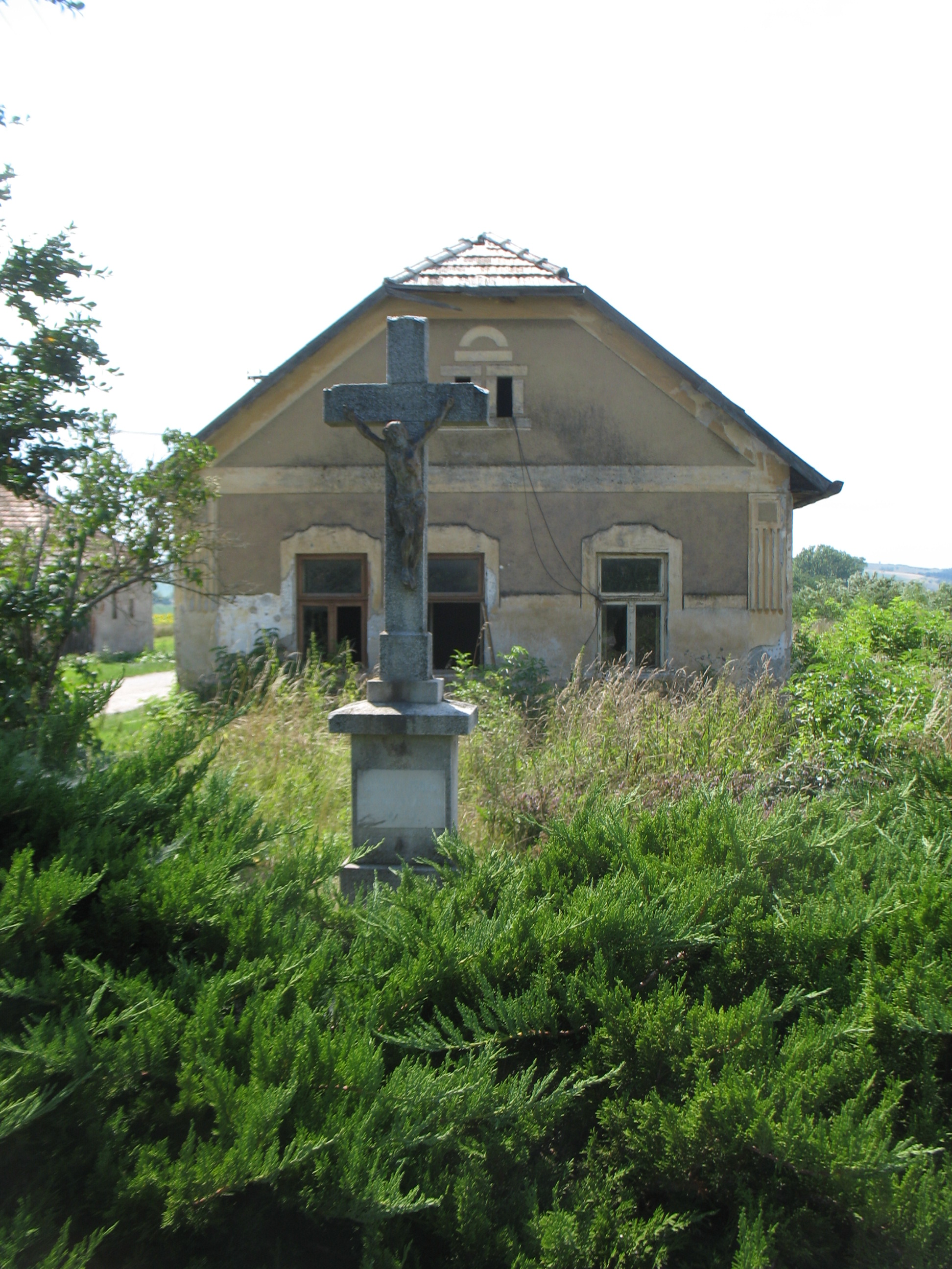 Méhi keresztSlovenčina: Včelince